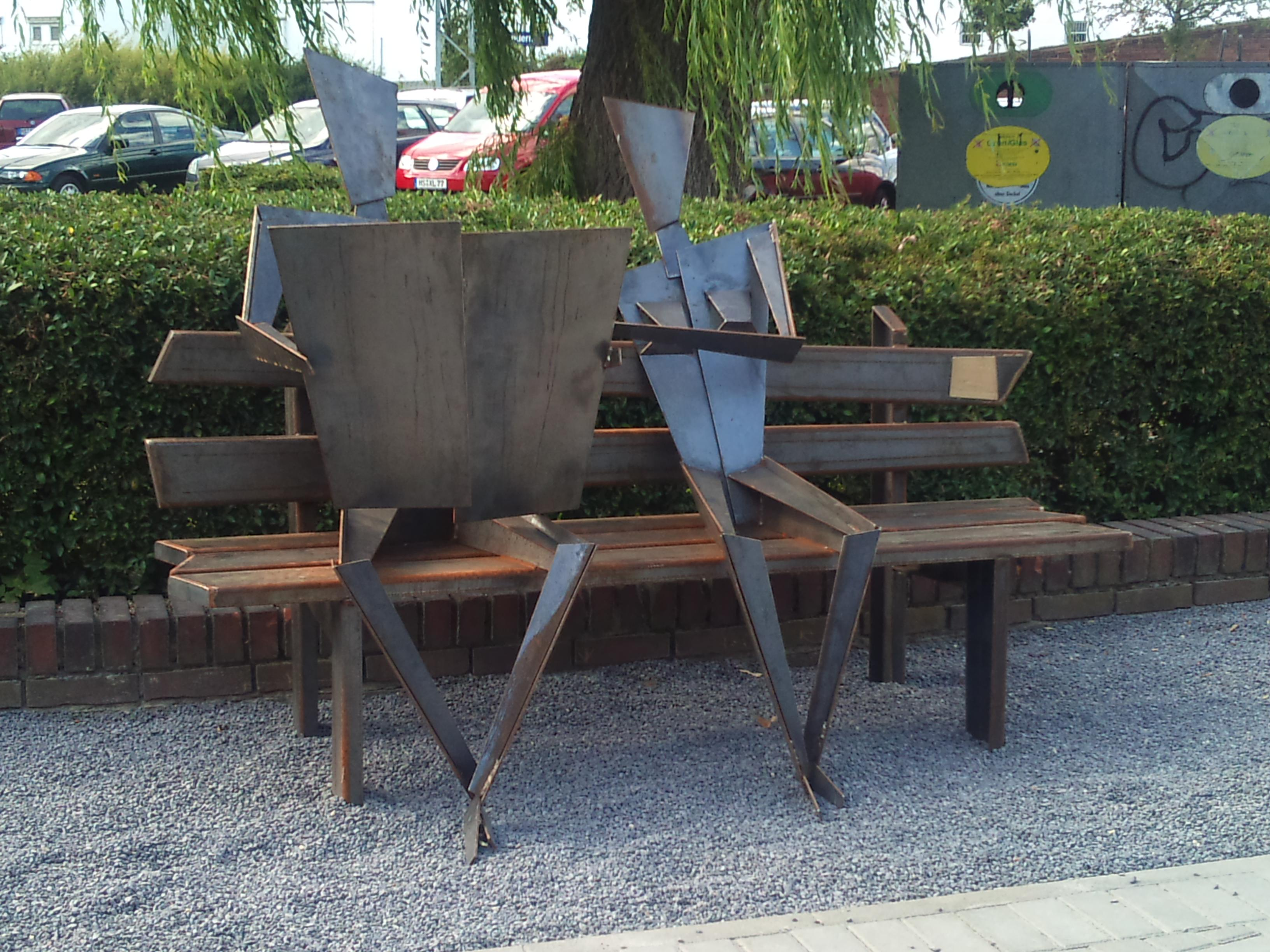 Willi Arlt, Skulptur Wartezeit, 2016, Geilenkirchenn-Lindern, Bahnhofsvorplatz